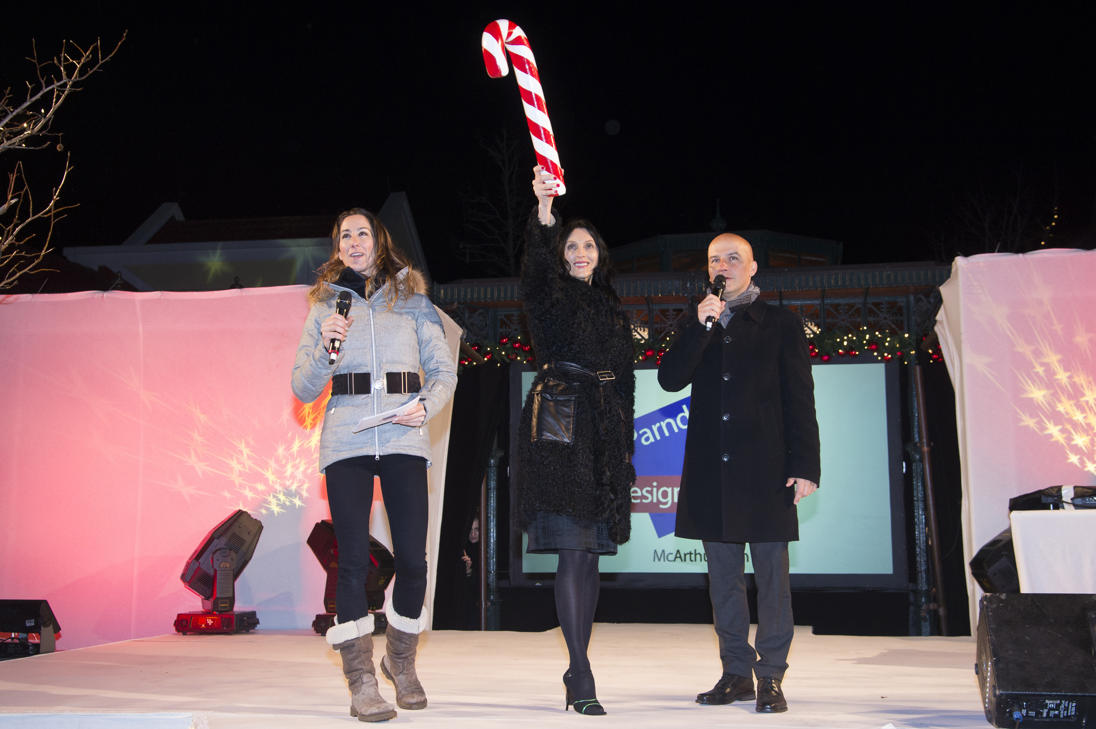 Stargast Susie Bick, Ehefrau von Musiker Nick Cave, erleuchtete mit der Zuckerstange feierlich die Lichter des großen Christbaums im McArthurGlen Designer Outlet Parndorf.